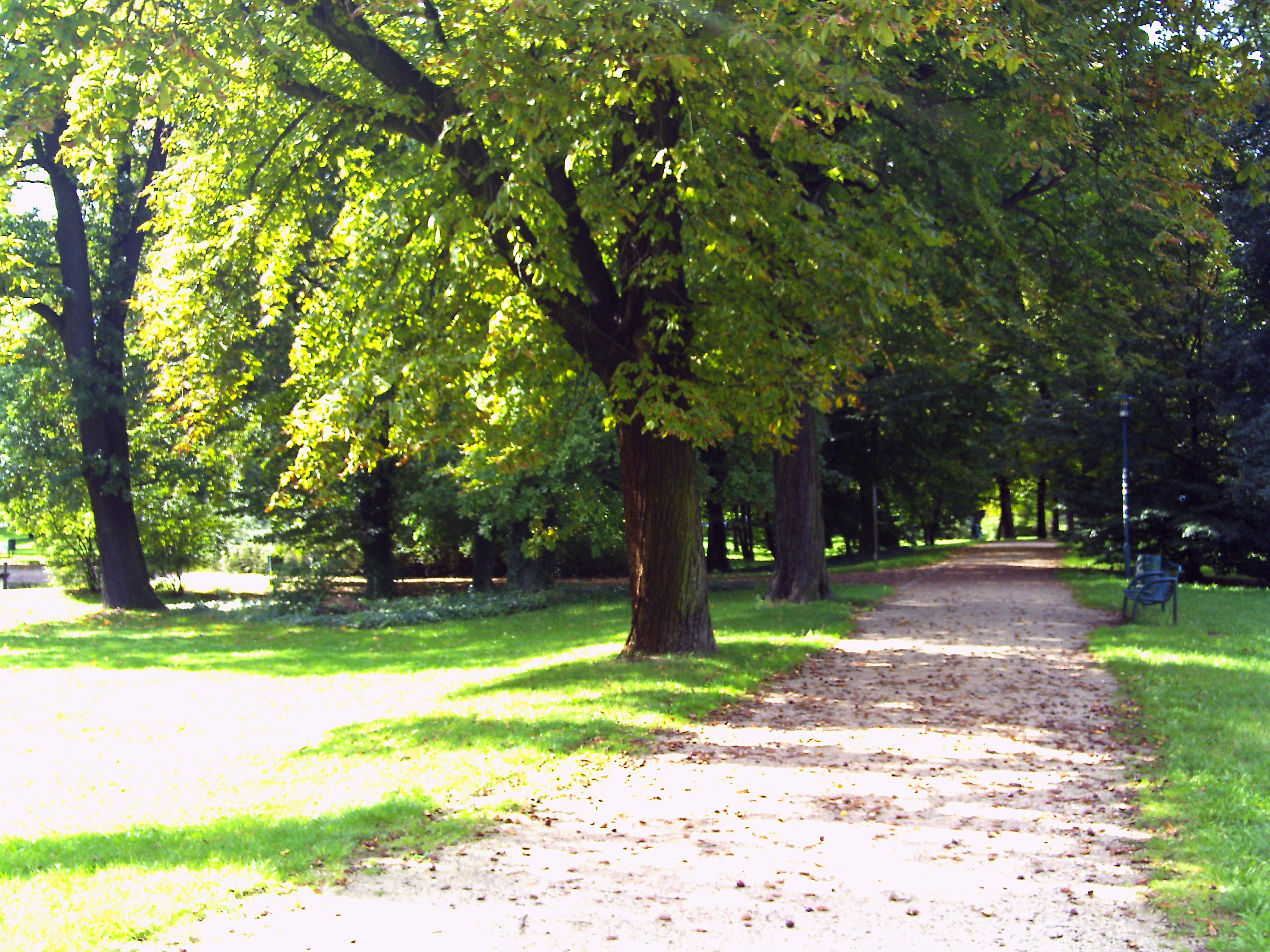 Eliaspark Cb